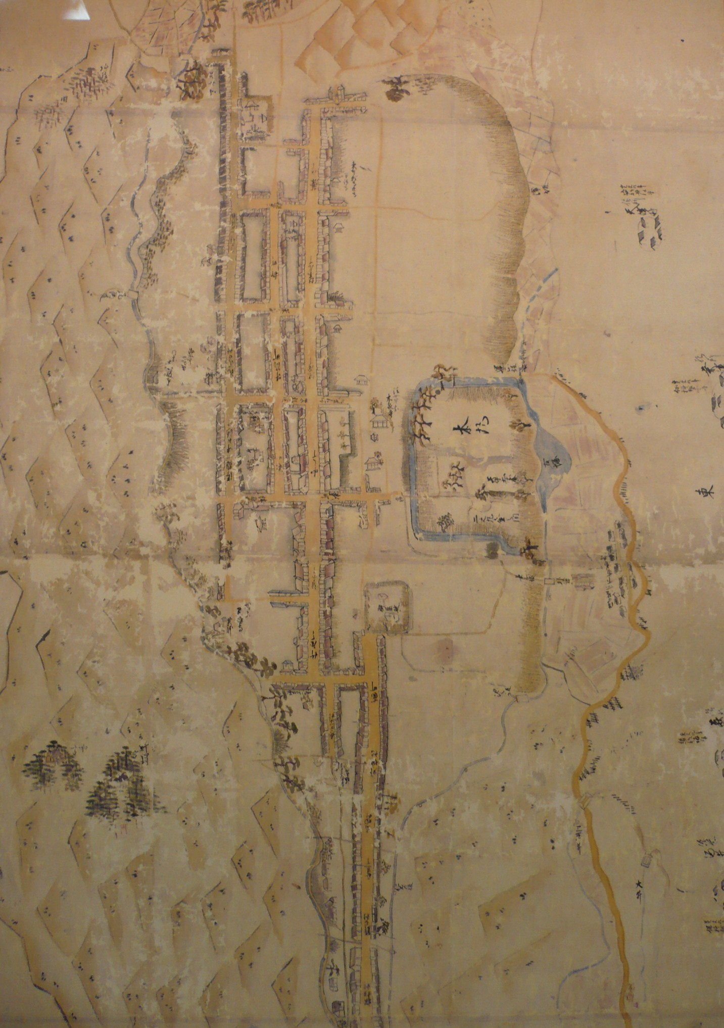 寛文9年伊丹郷町絵図（複製）